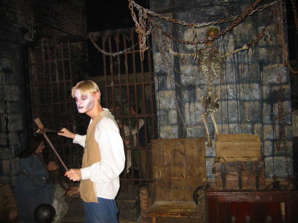 Torturist på London Dungeons